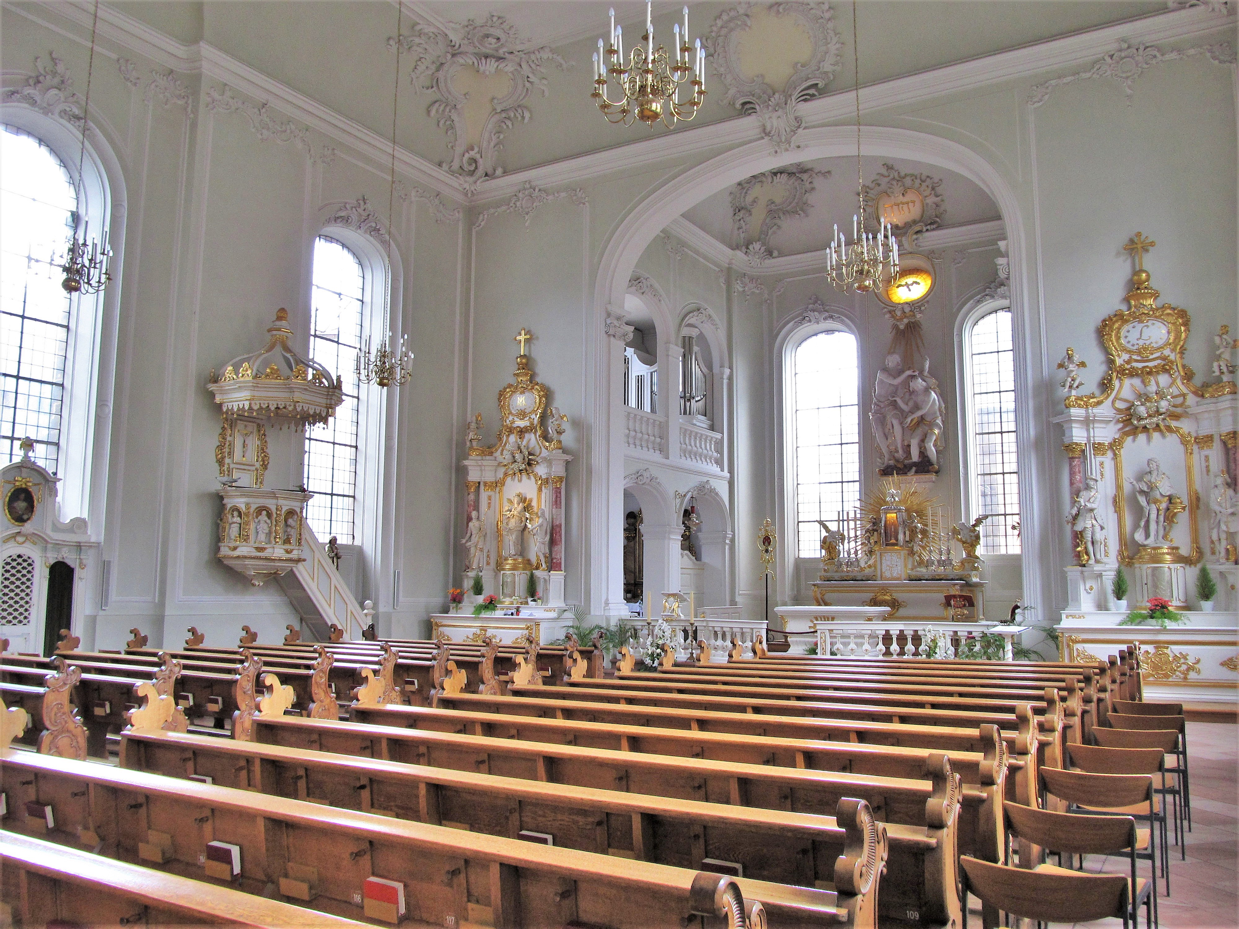 Blick ins Innere der Basilika St. Johann in Saarbrücken, Saarland